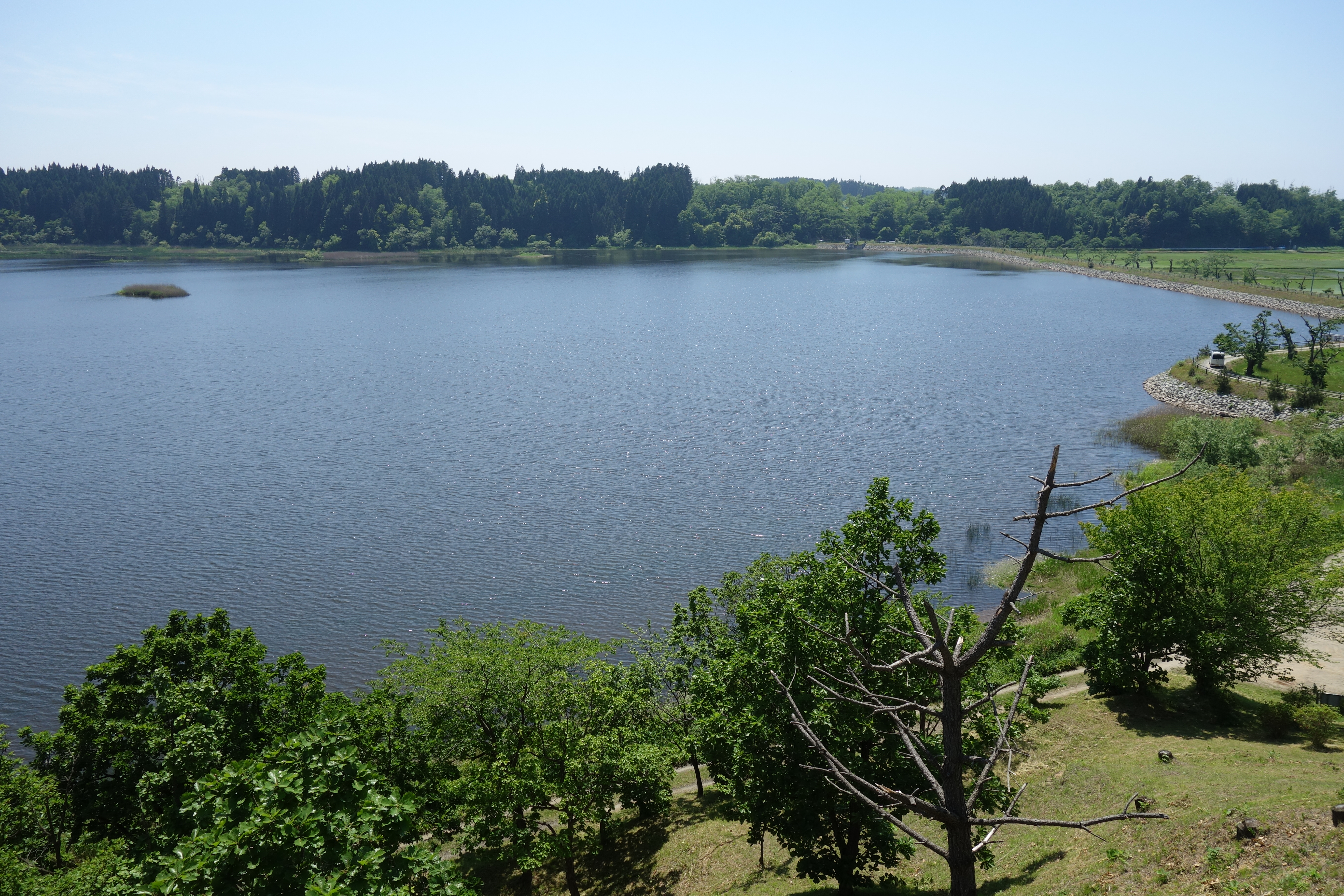 能代市 小友沼の春